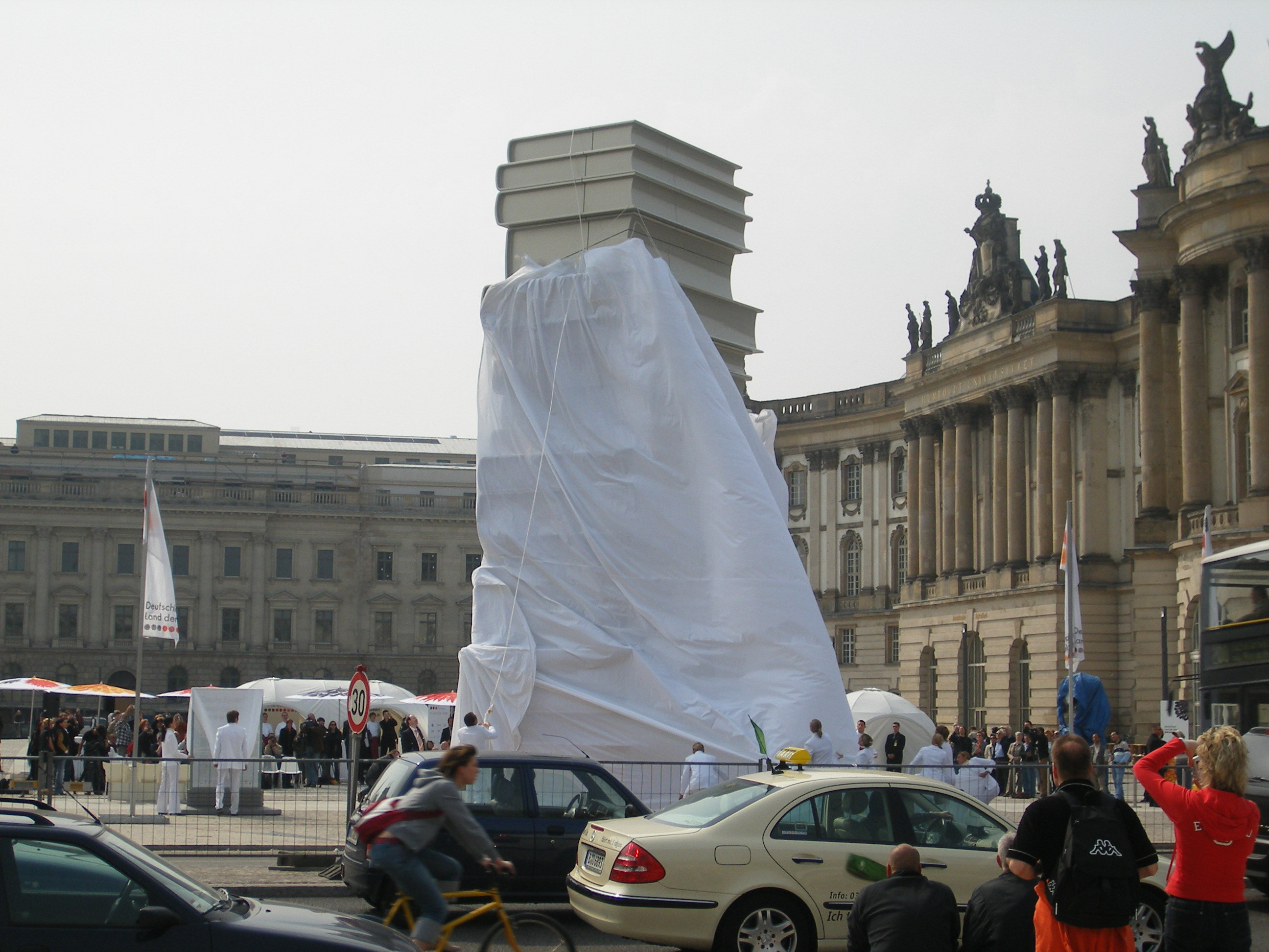 Berlin, Enthüllung Skulptur "Der moderne Buchdruck" am Bebelplatz